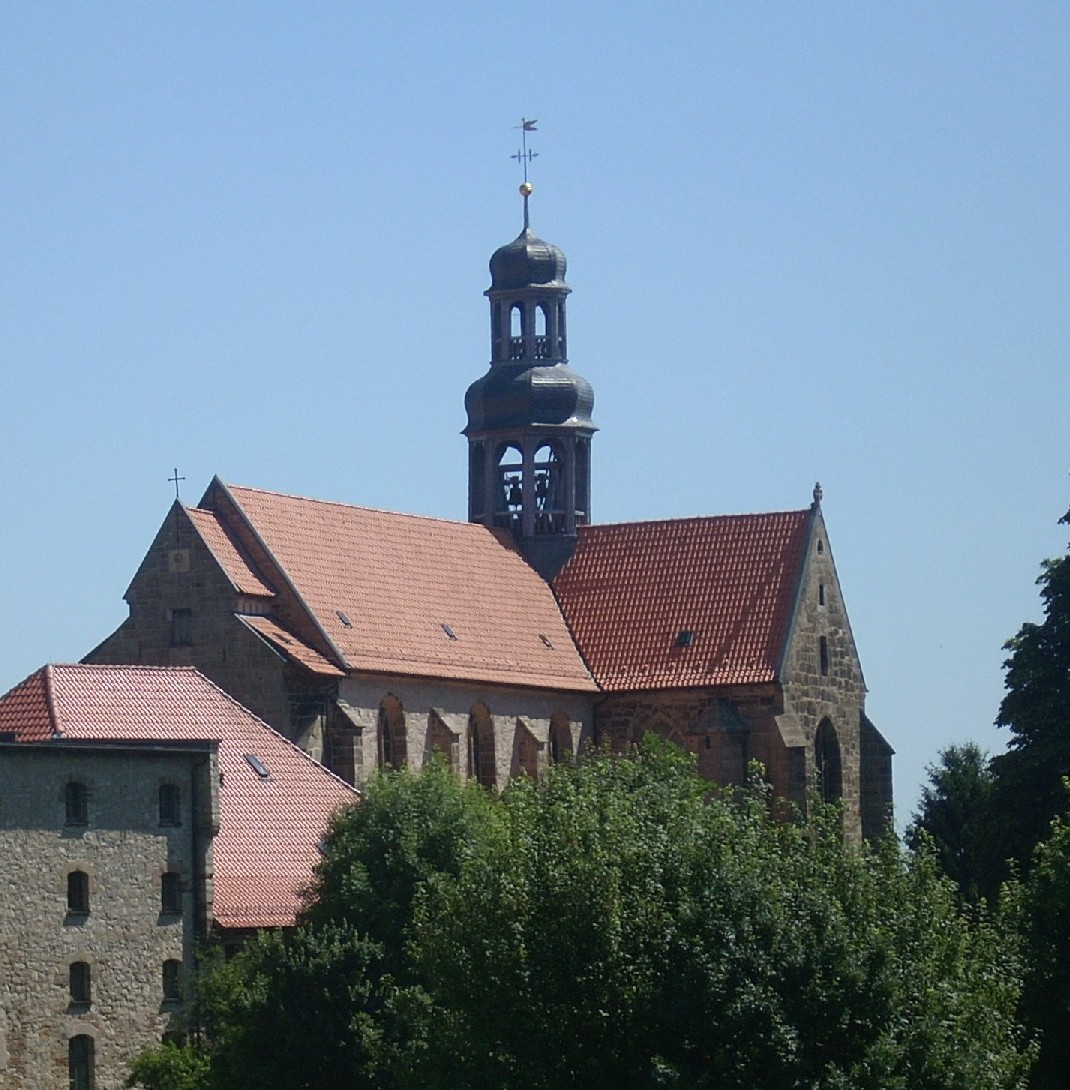 Kloster Marienrode, Klosterkirche St. Michael von Südwesten